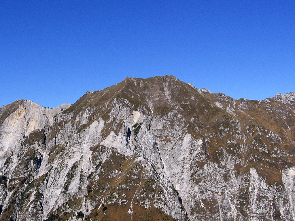 Il Monte Chiampon visto dalla cima del Monte Caurnan